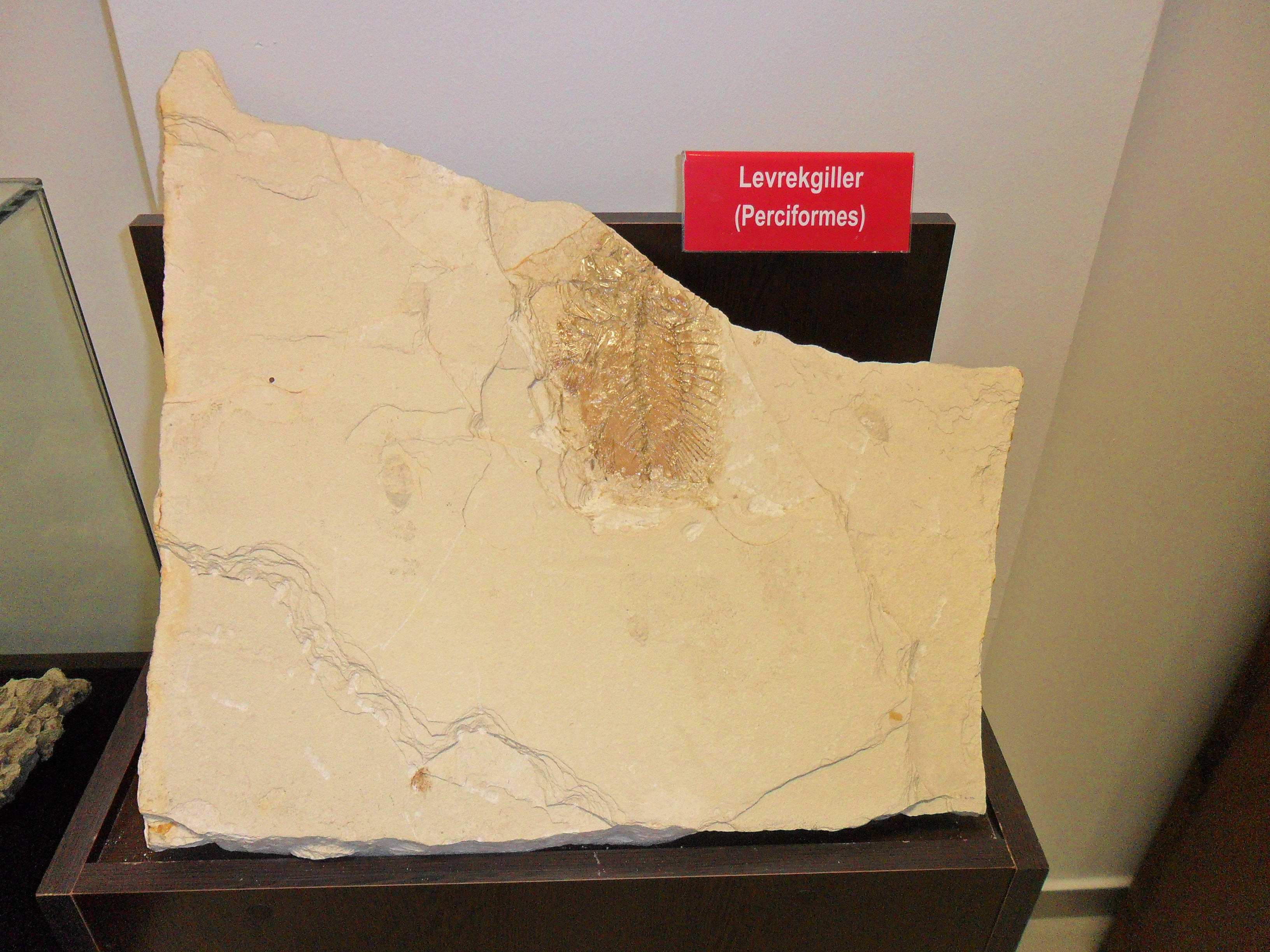 Mersin Deniz Müzesinde sergilenme olan ve bir levrekgile ait fosil.